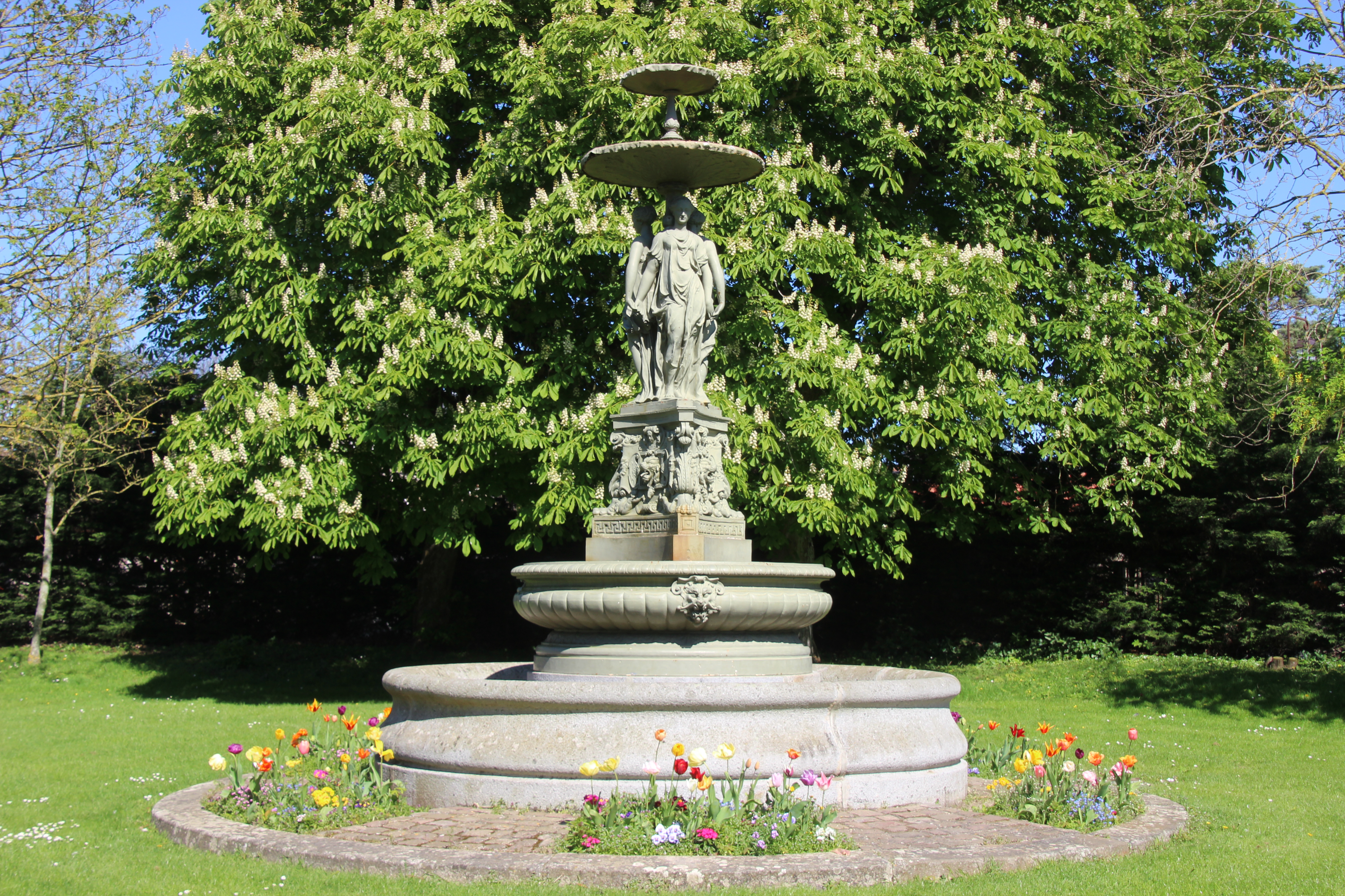 Fontaine des trois Grâces de Langrune-sur-Mer [#100wikicommonsdays day 80]